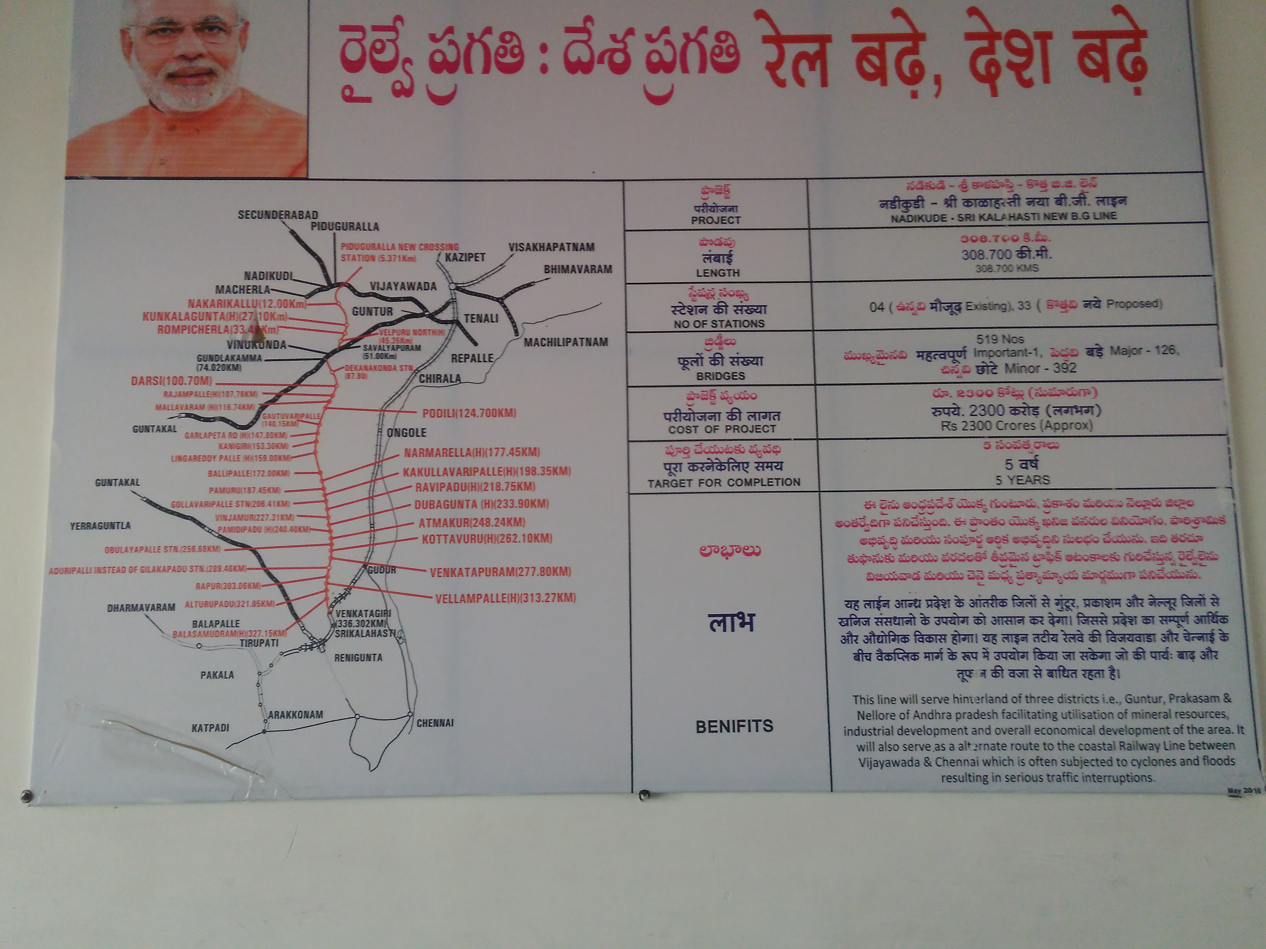 Railway lline proposal details hoarding